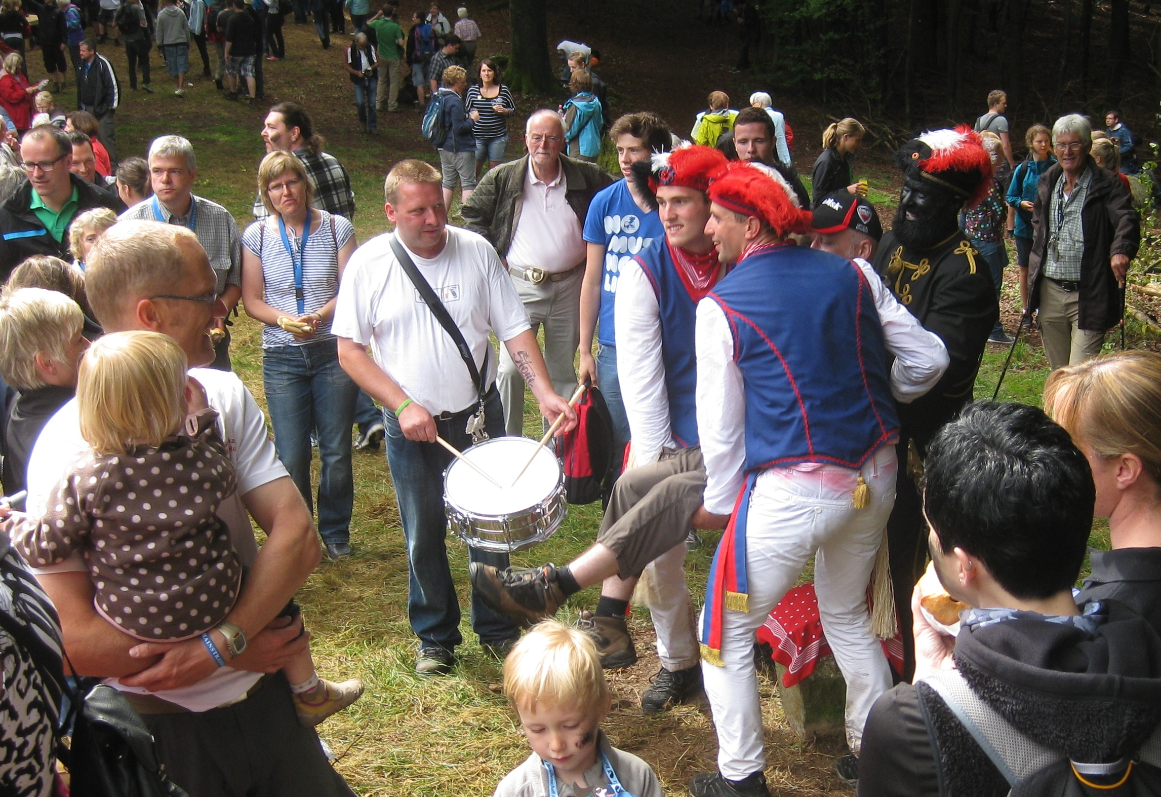 Deutschland, Biedenkopf: Die Symbolfiguren des Biedenkopfer Grenzgangs (Mohr und zwei Wettläufer) beim "Huppchen" auf einem Grenzstein während der Rast auf dem 1.Frühstücksplatz nahe dem Hausberg, der Sackpfeife.